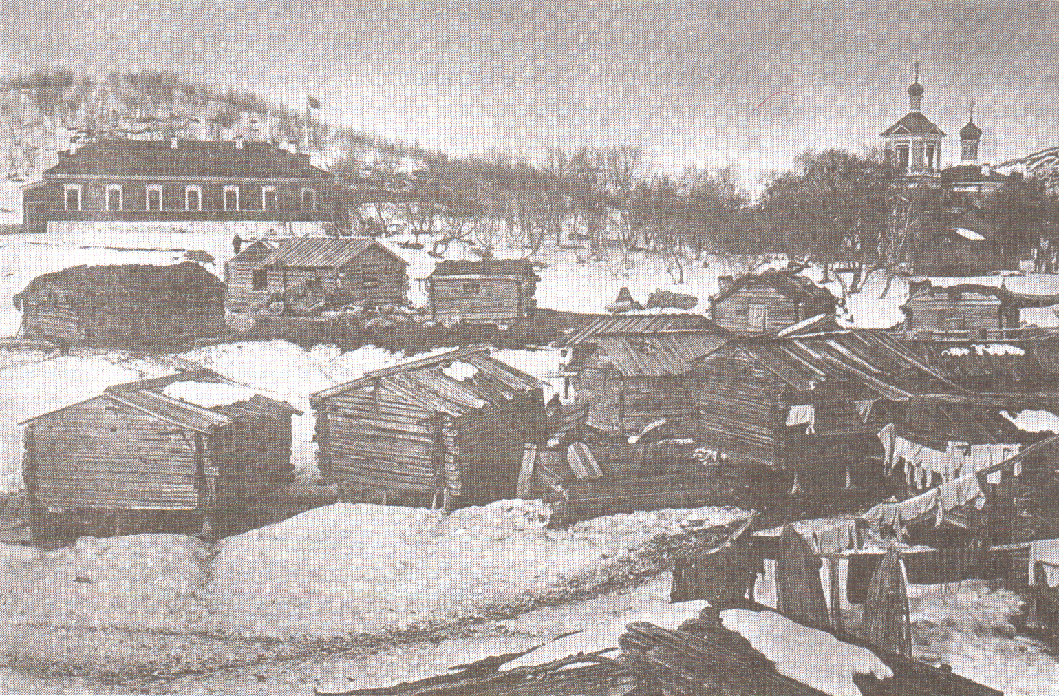 Пазрецкий погост. Общий вид, на переднем плане амбар на ножках., Кольский полуостров, 1911 год